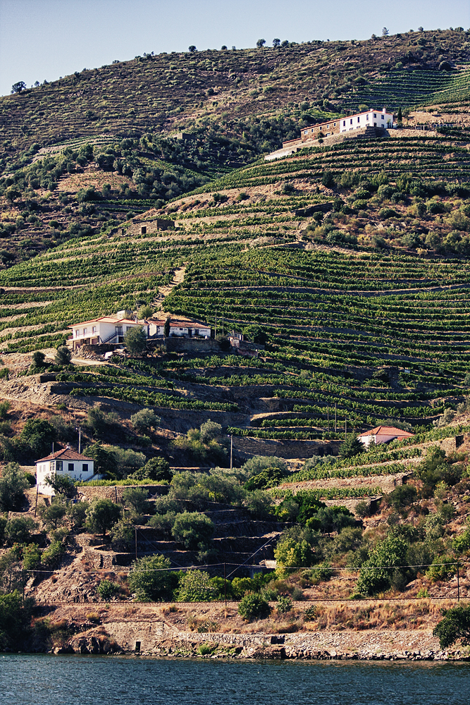 a paisagem do Alto Douro This file was uploaded for Wiki Loves Monuments in Portugal with the unique identifier 8983641.